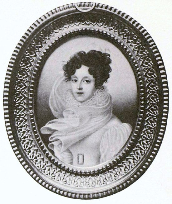 Anna Petrovna Kozhukhova, 1793-1827